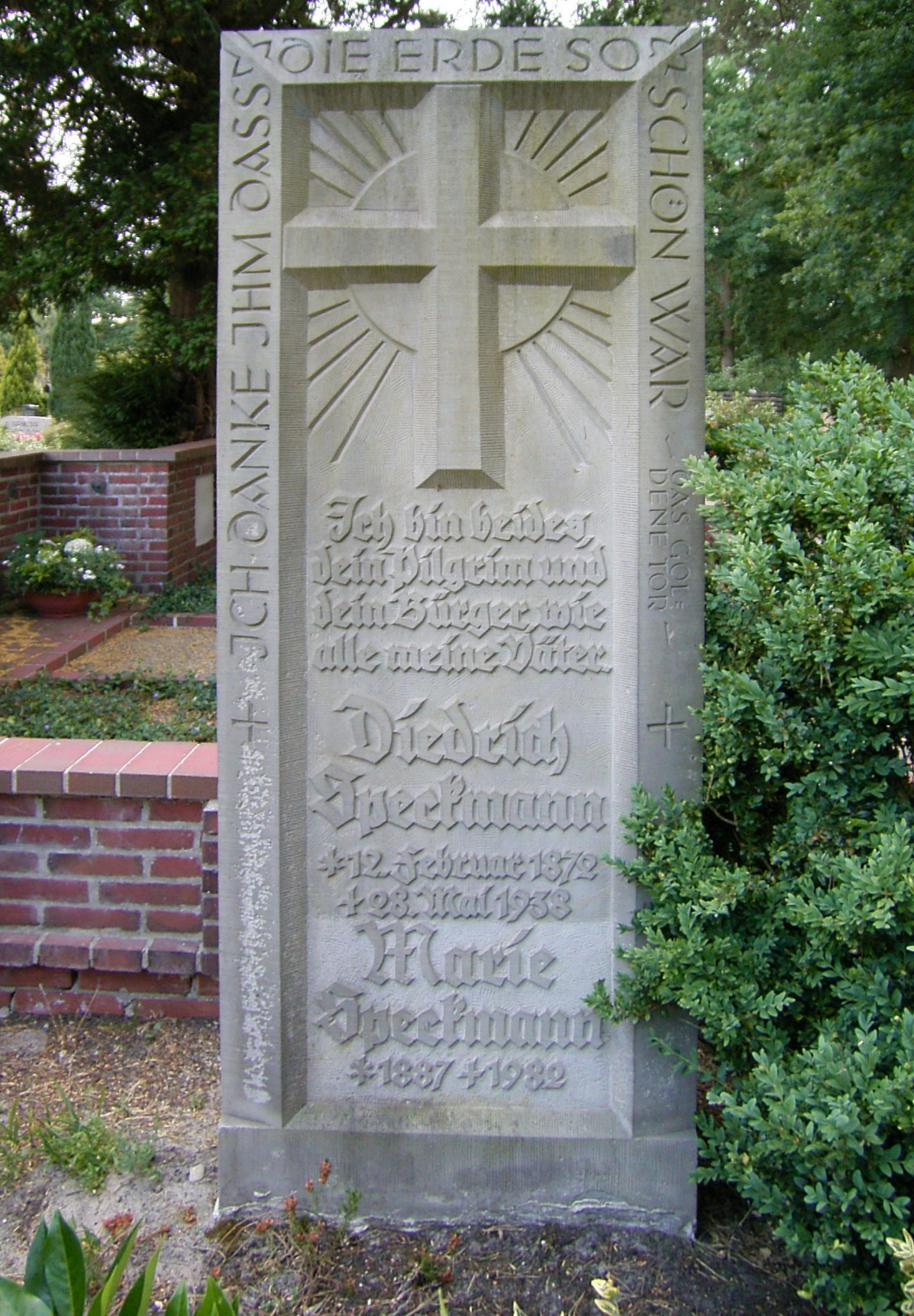 Grabstelle Marie (1887-1982) und Heinrich Speckmann (1872-1938)